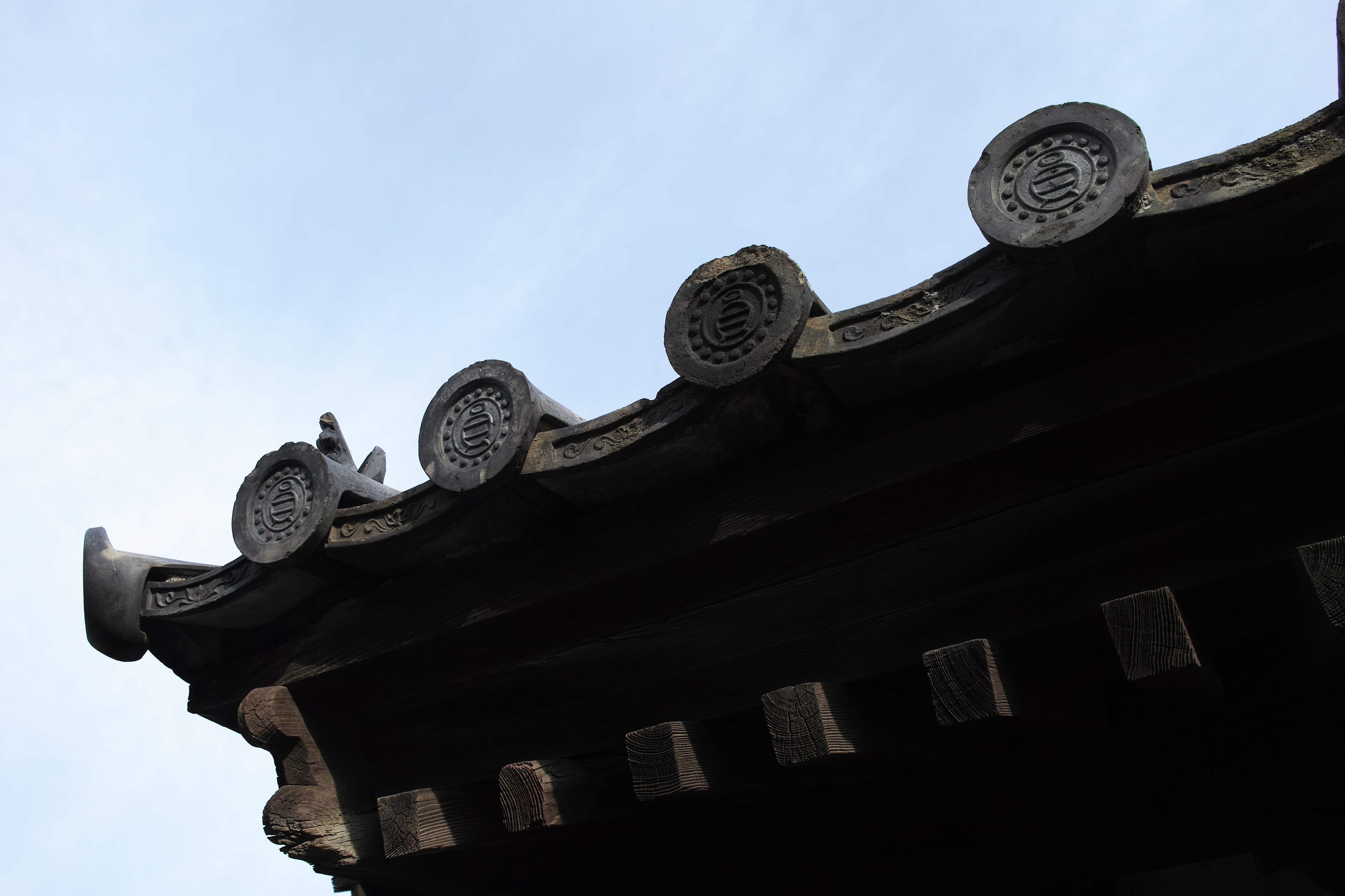 堺市北区 円通寺の軒瓦です。